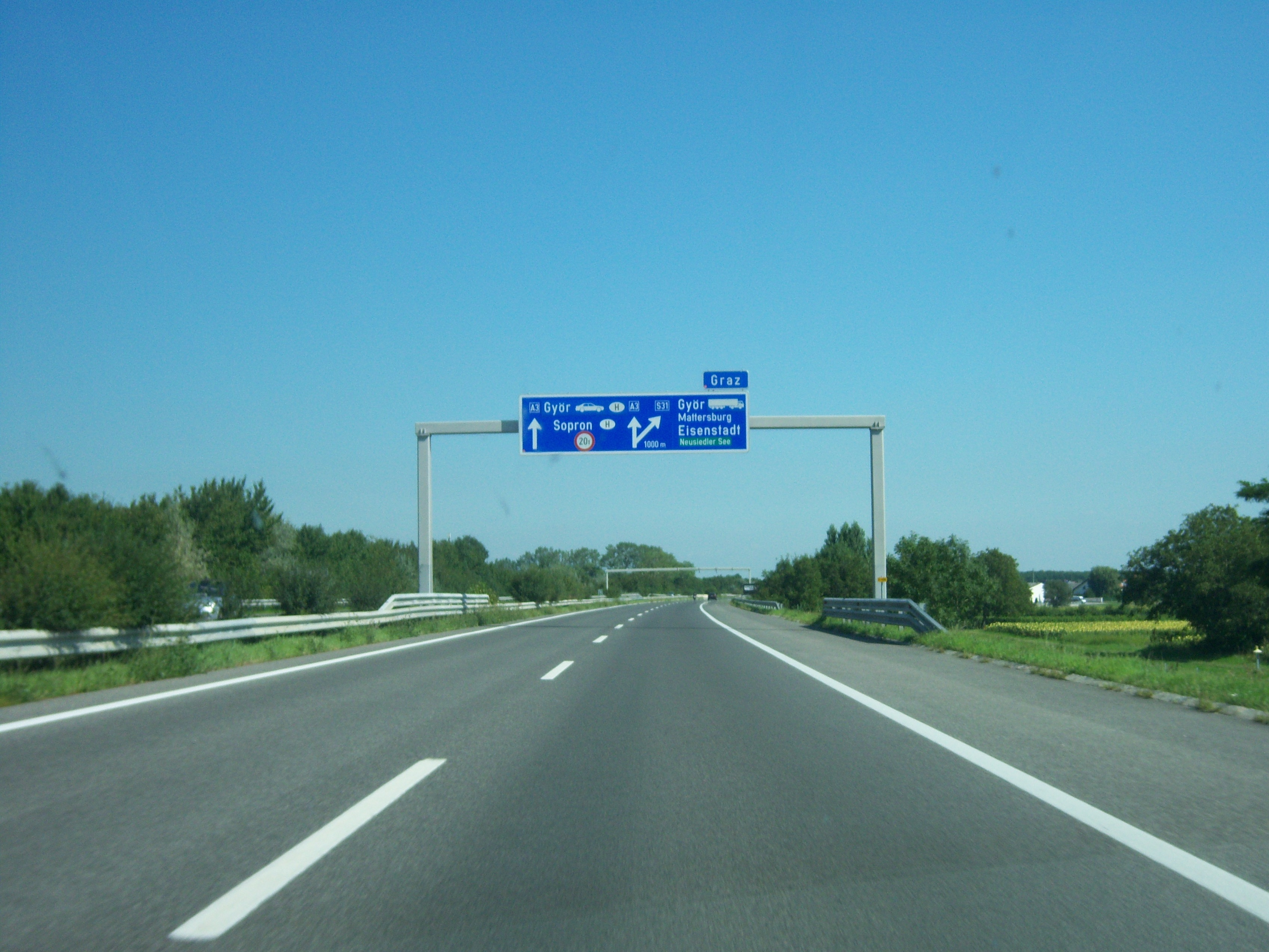 Südost Autobahn A3 Richtung Eisenstadt vor dem Knoten Eisenstadt